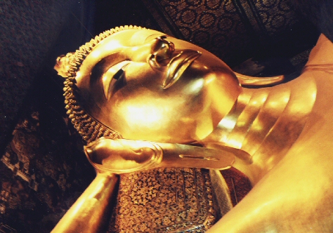 Bouddha couché du Wat Pho Auteur: Louis Paquet (moi-même) Louis Paquet